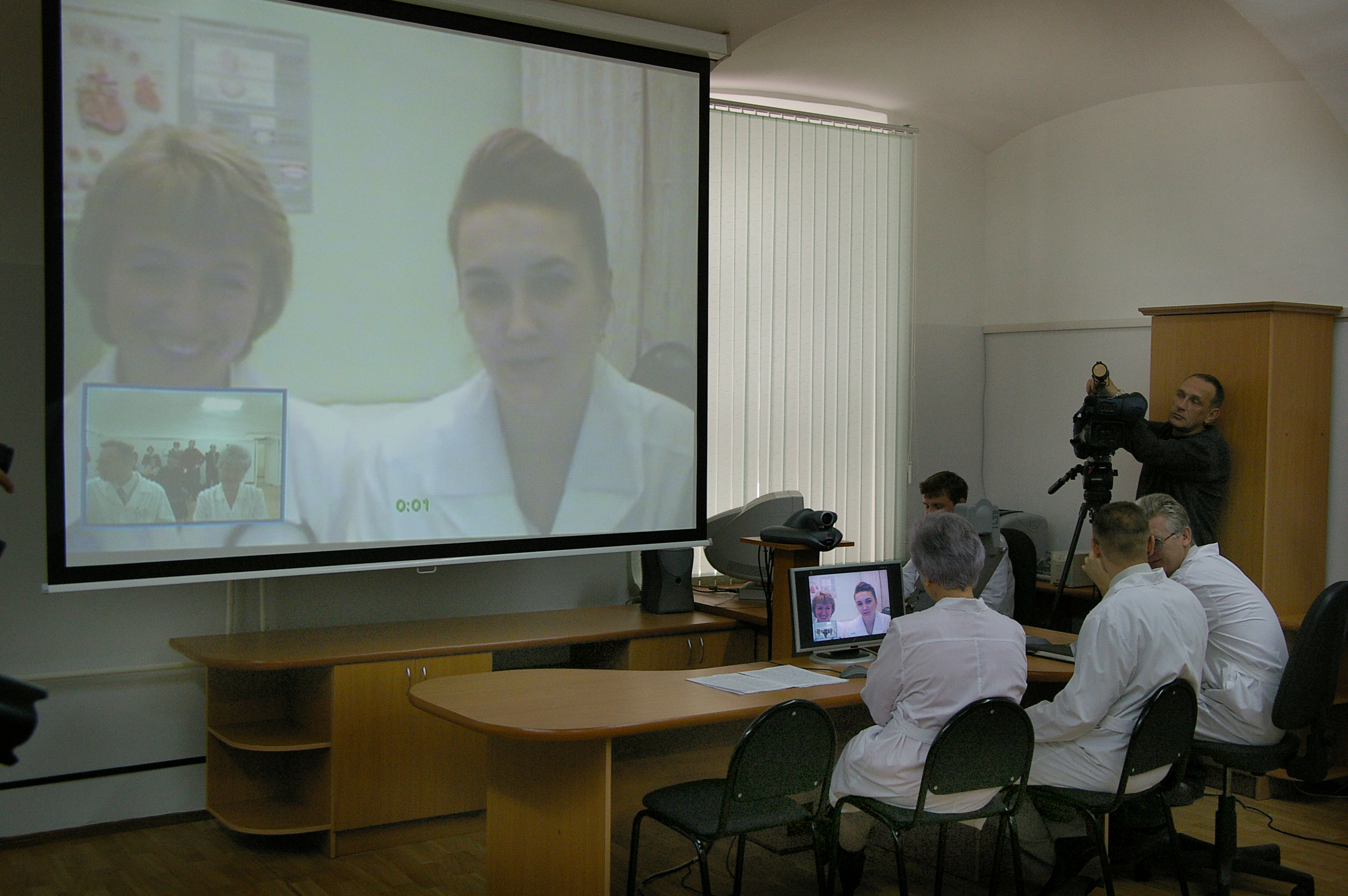 Сеанс телемедицины: Каменка-Пенза-Москва